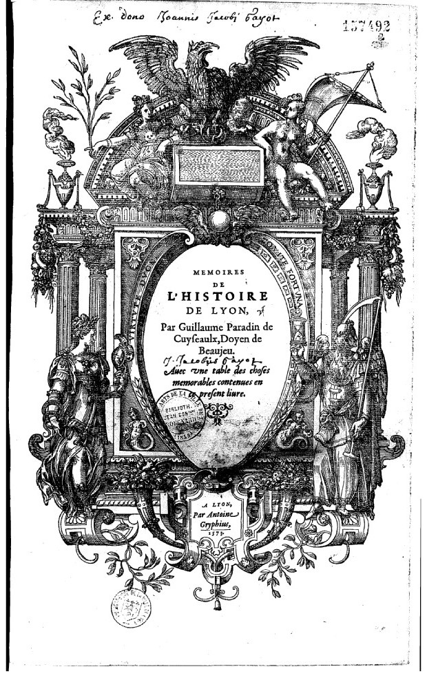 Première page de l'édition de 1573 des Mémoires de l'histoire de Lyon publiée par Guillaume Paradin. Conservé à la Bibliothèque municipale de Lyon, numérisé sur Gallica.